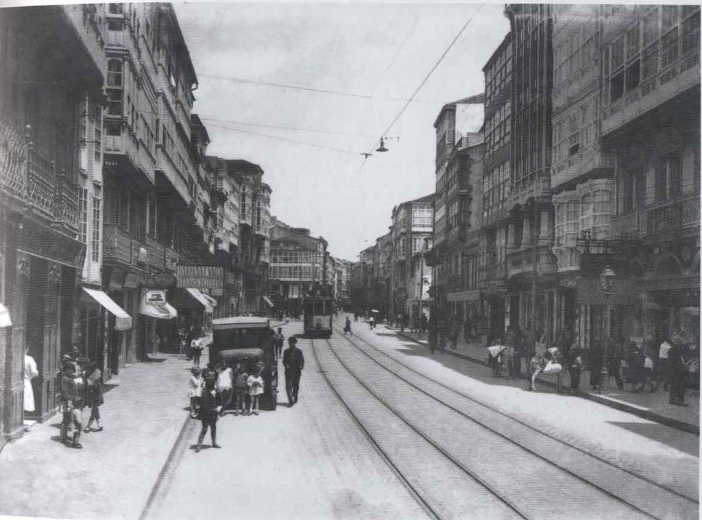 En esta antigua foto de A Coruña se puede observar el antiguo tranvía de la ciudad que operó desde 1902 hasta 1962. A mediados de los 90 se comenzó la recuperación del tranvía. (Fuente original)